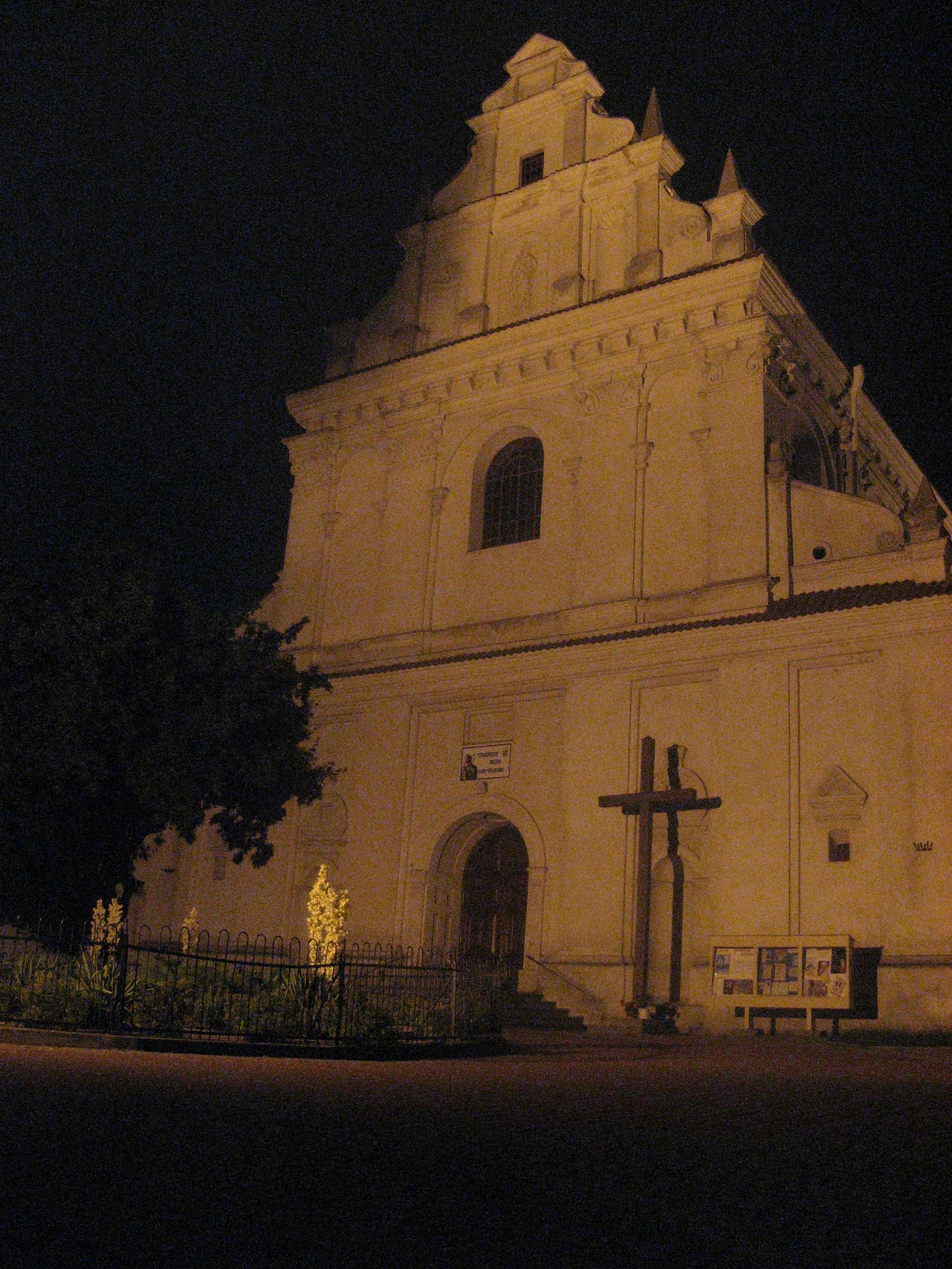 Fasada kościoła p.w. św. Agnieszki w Lublinie.